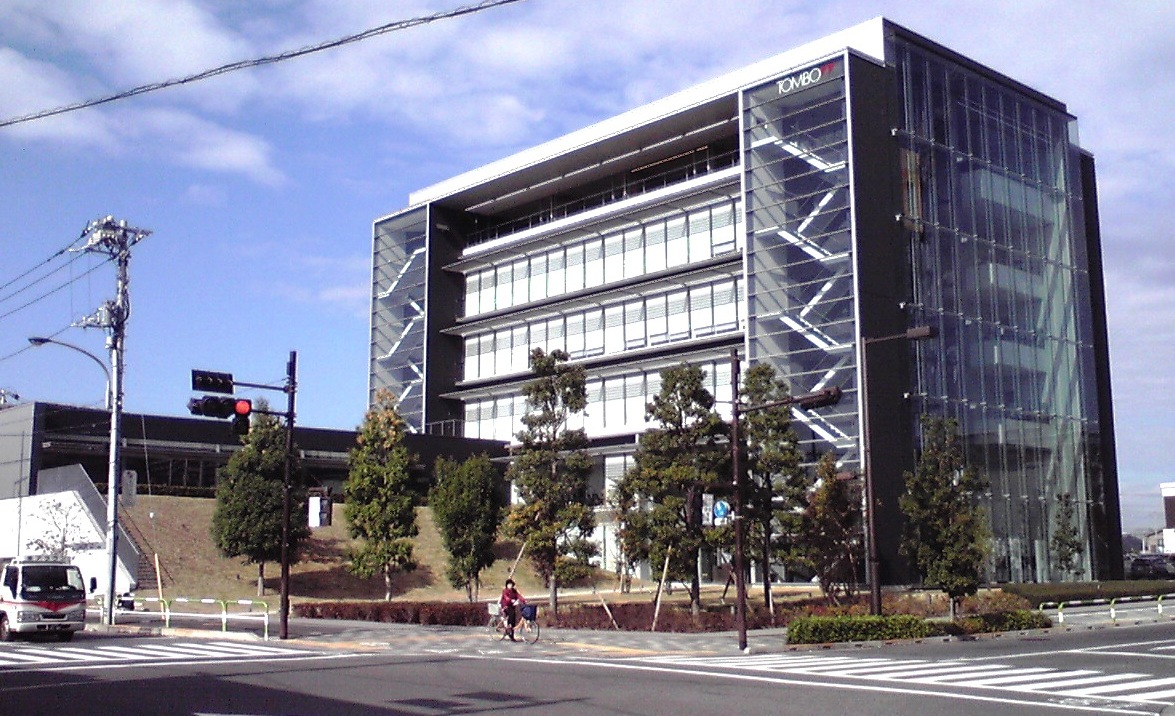 トンボ鉛筆本社ビル